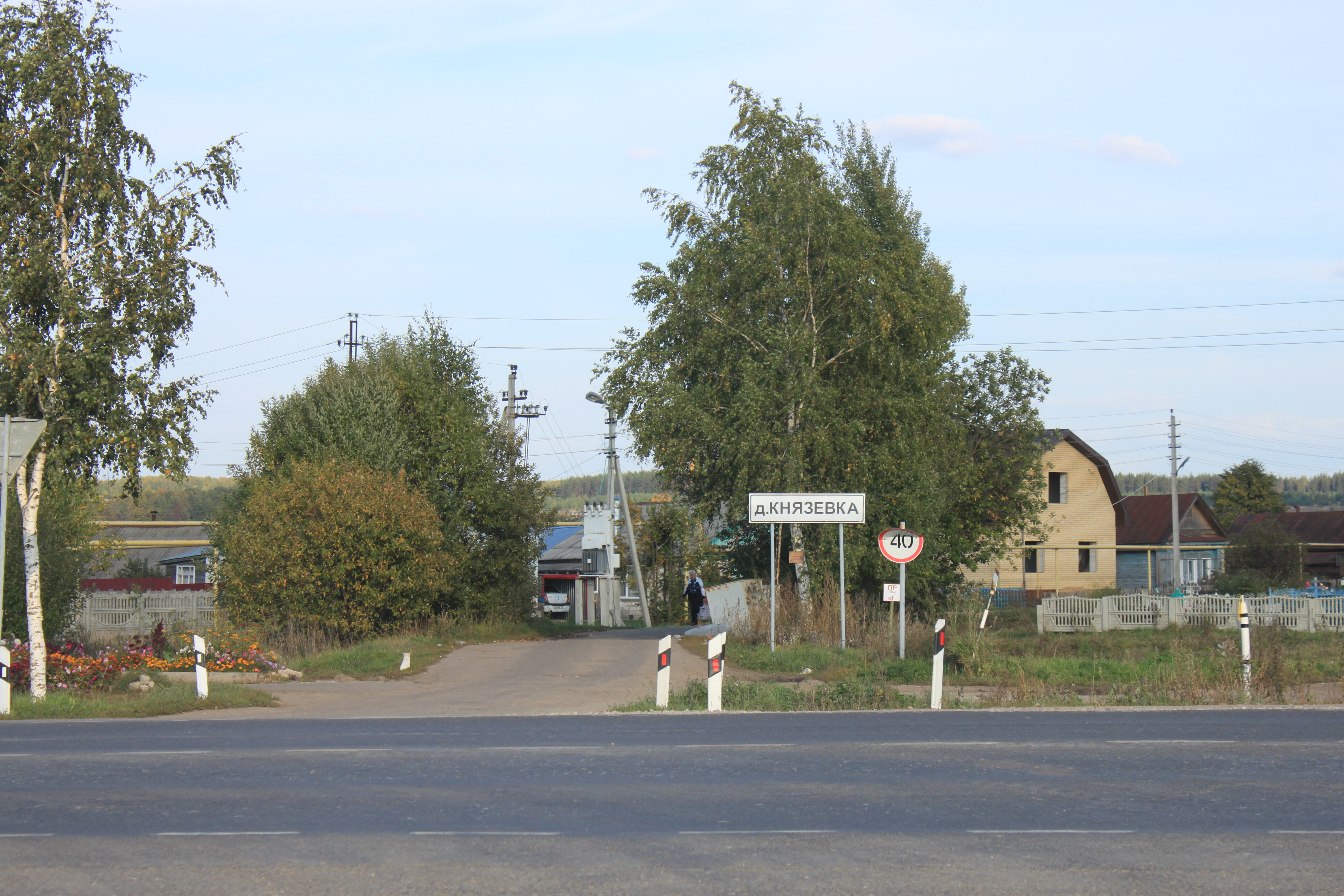 въезд в деревю